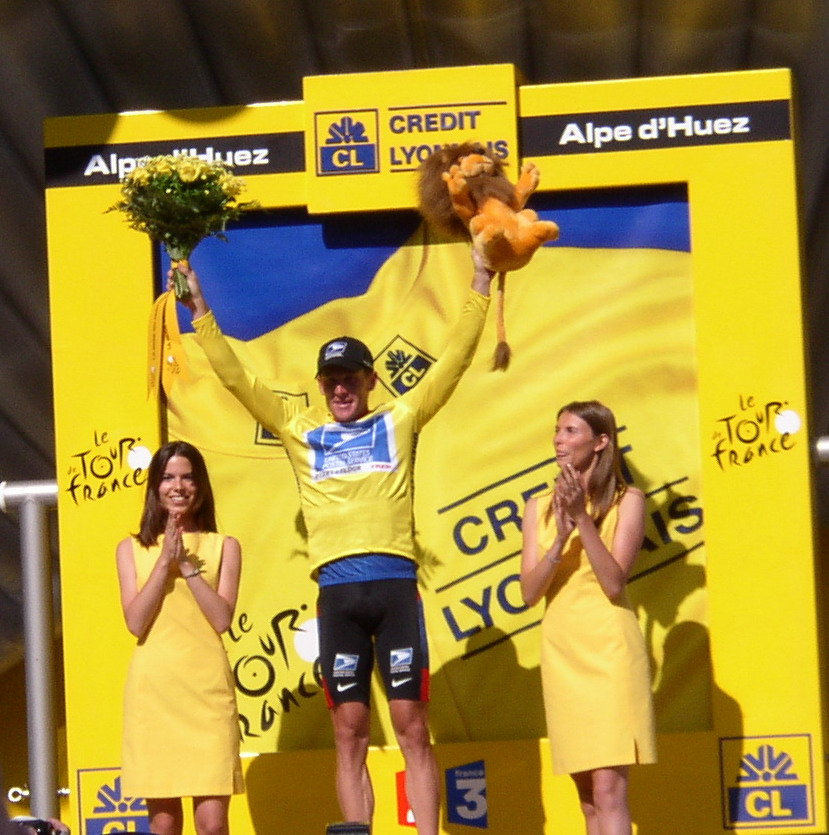 Lance Armstrong, in maglia gialla di leader della classifica generale, all'arrivo dell'8a tappa del Tour de France 2003, Sallanches - L'Alpe d'Huez.